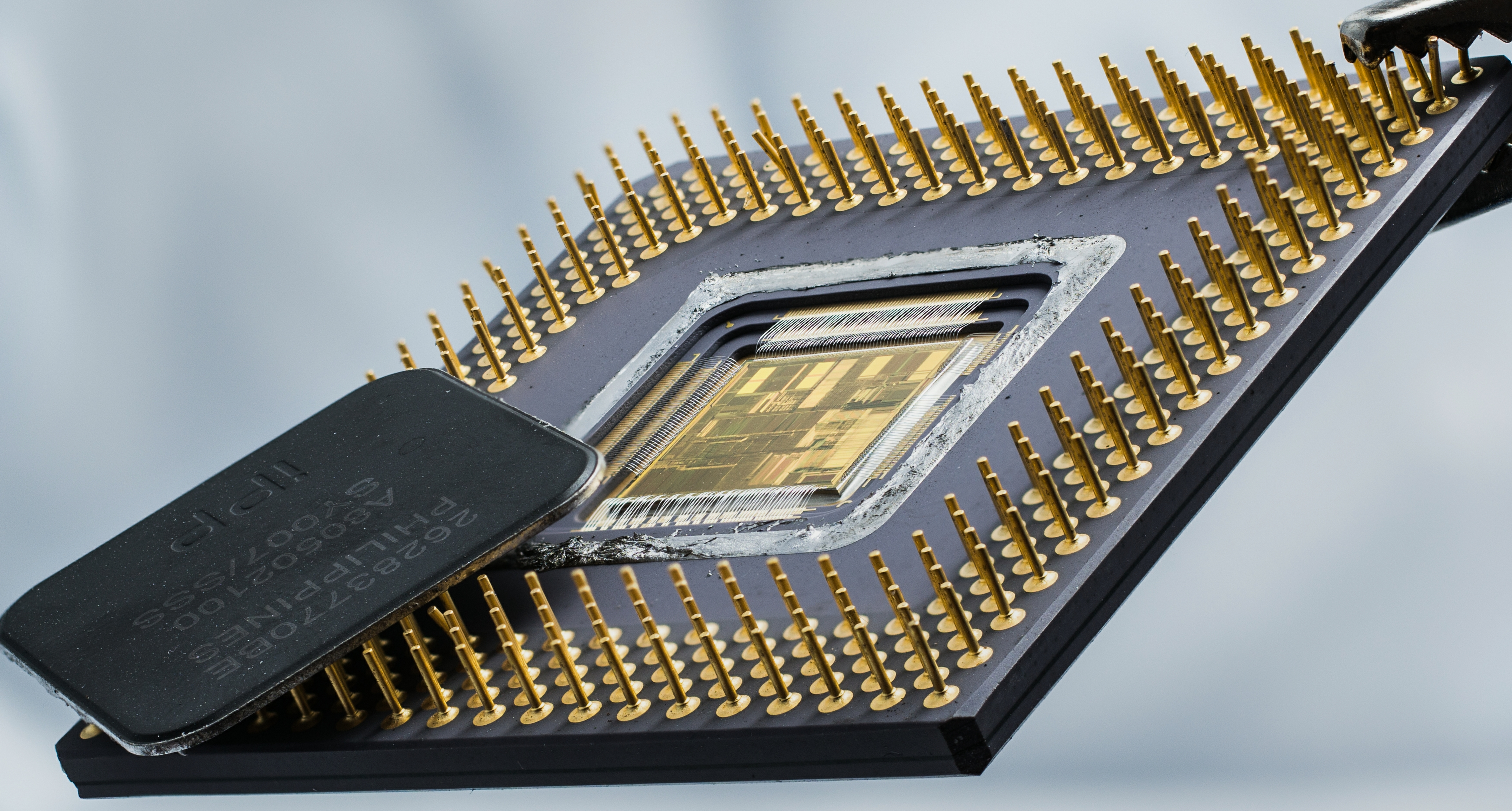 IntelPentium100_2015-03-17_07-45-51 M=B R=50 S=10_-_Stack-DSC01979-DSC02023